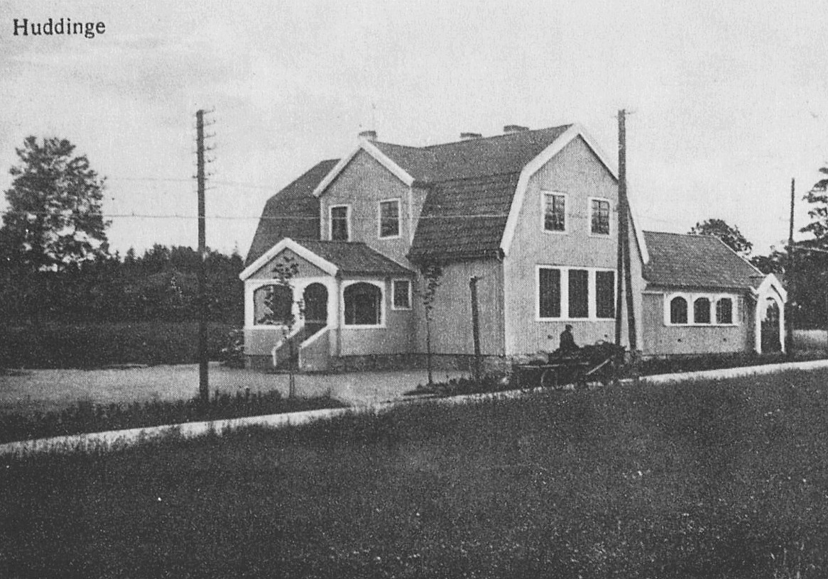 Huddinge kyrkskola, invigd 1914, foto från 1920-talet